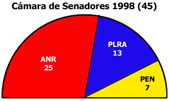 cámara de senadores año 98